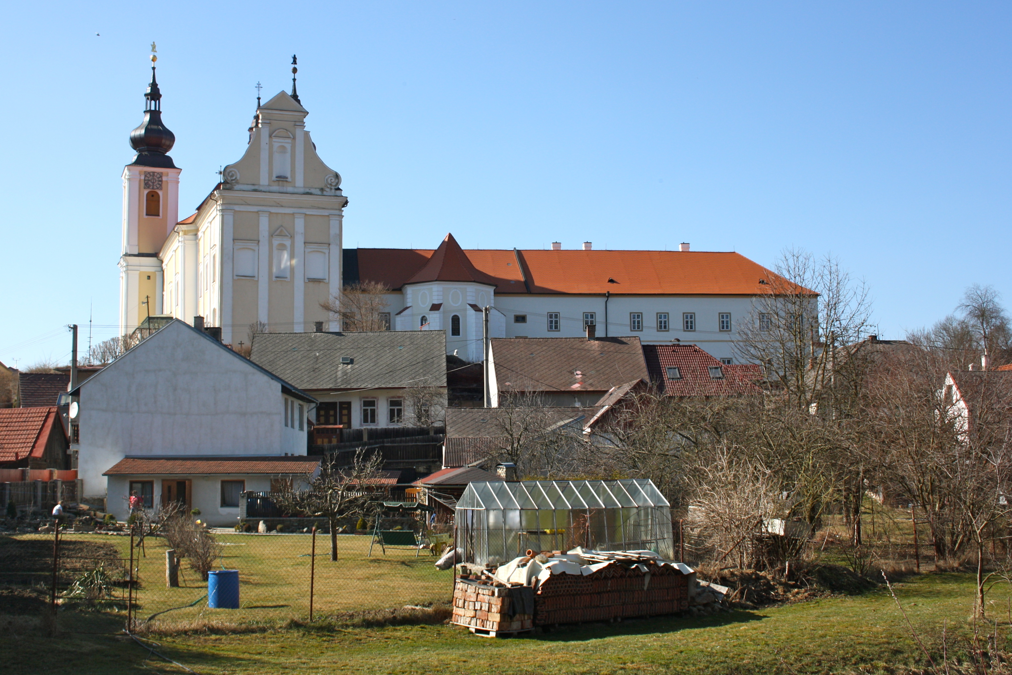 Klášter premonstrátský (Nová Říše), Nová Říše 1